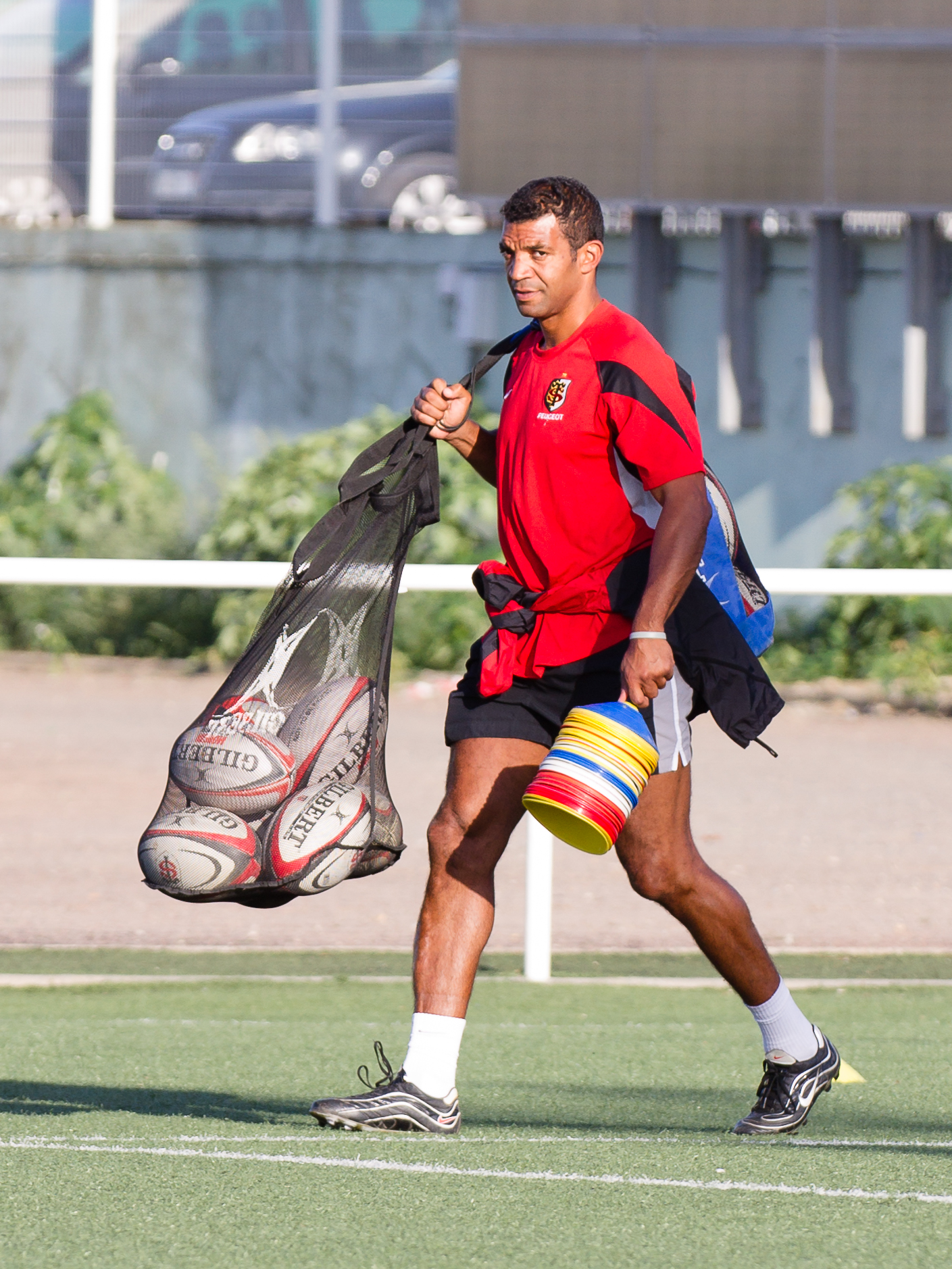 Emile Ntamack lors d'un entrainement avec les jeunes du stade toulousain le 24 au Stade Ernest-Wallon